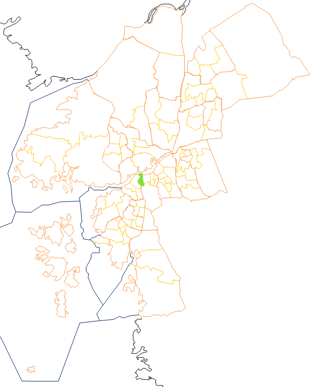 Karta som visar primärområdes belägenhet i Göteborg